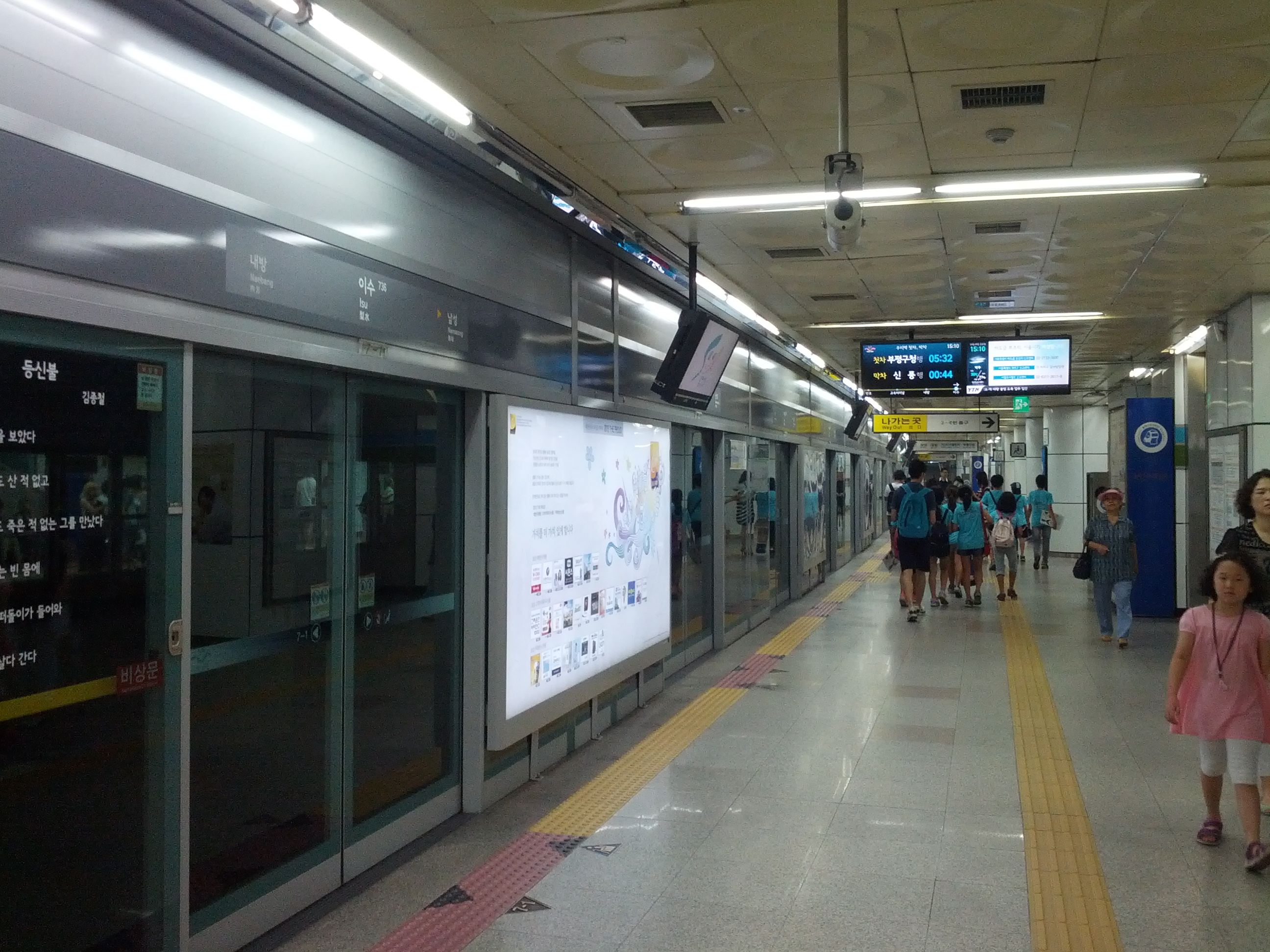 7호선 이수역 승강장